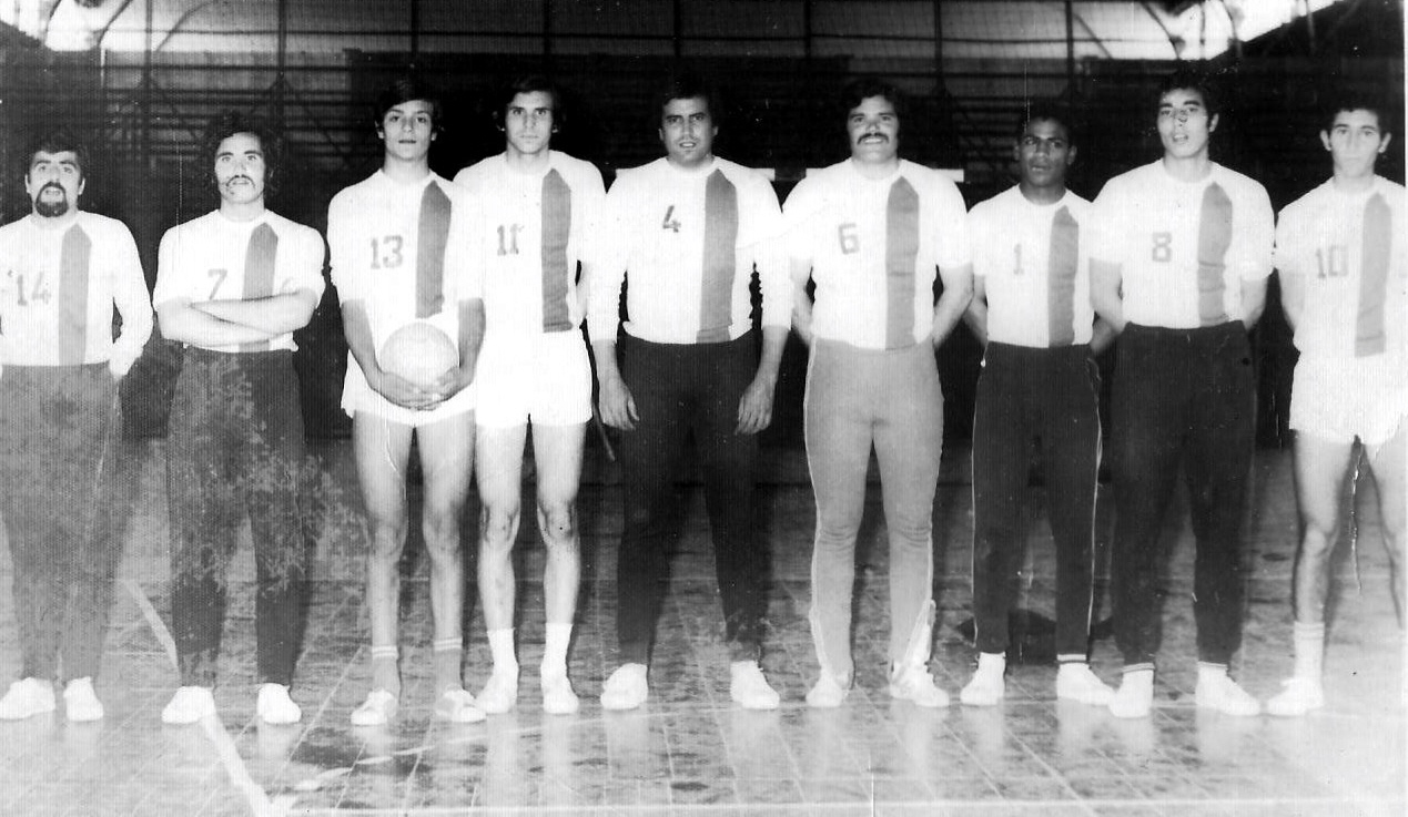 Équipe de l'Avenir sportif de La Marsa (ASM) photographiée au Palais de la foire de Tunis, lors de la demi-finale de la coupe de Tunisie de volley-ball ayant opposée l'ASM au Club olympique de Kélibia, remportée par l'ASM (3-1).De gauche à droite : Pierre Boccara (14), Rafik Hayder (7), Ezzeddine Mhedhbi (13), Belhassen Mestiri (11), Chedly Fazaa (4), Raja Hayder (6), Moussa Ouergli (1), Naceur Bounatouf (8) et Adnène Boukef (10)